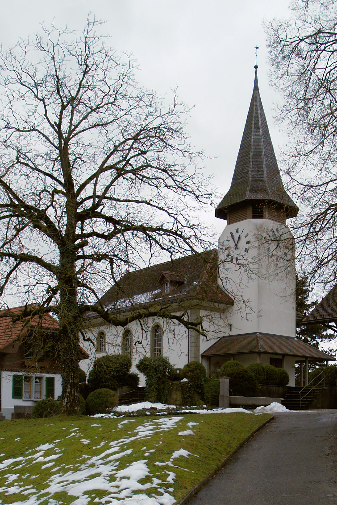 Kirche von Grafenried (Ansicht von Nordwesten)